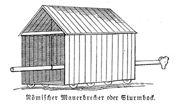 Aries, römische Kriegsmaschine